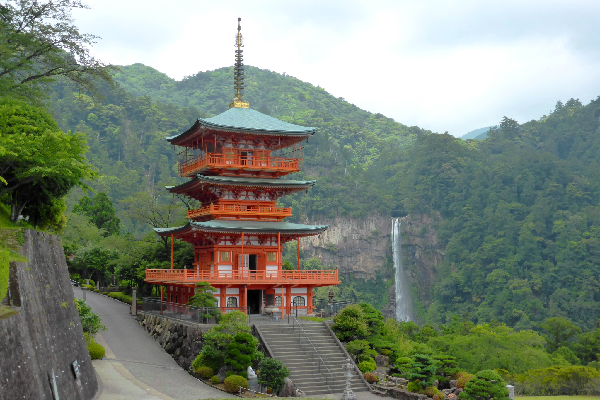 Seiganto-ji, Sanju-no-to (Three-storied Pagoda) -1 (June 2014)